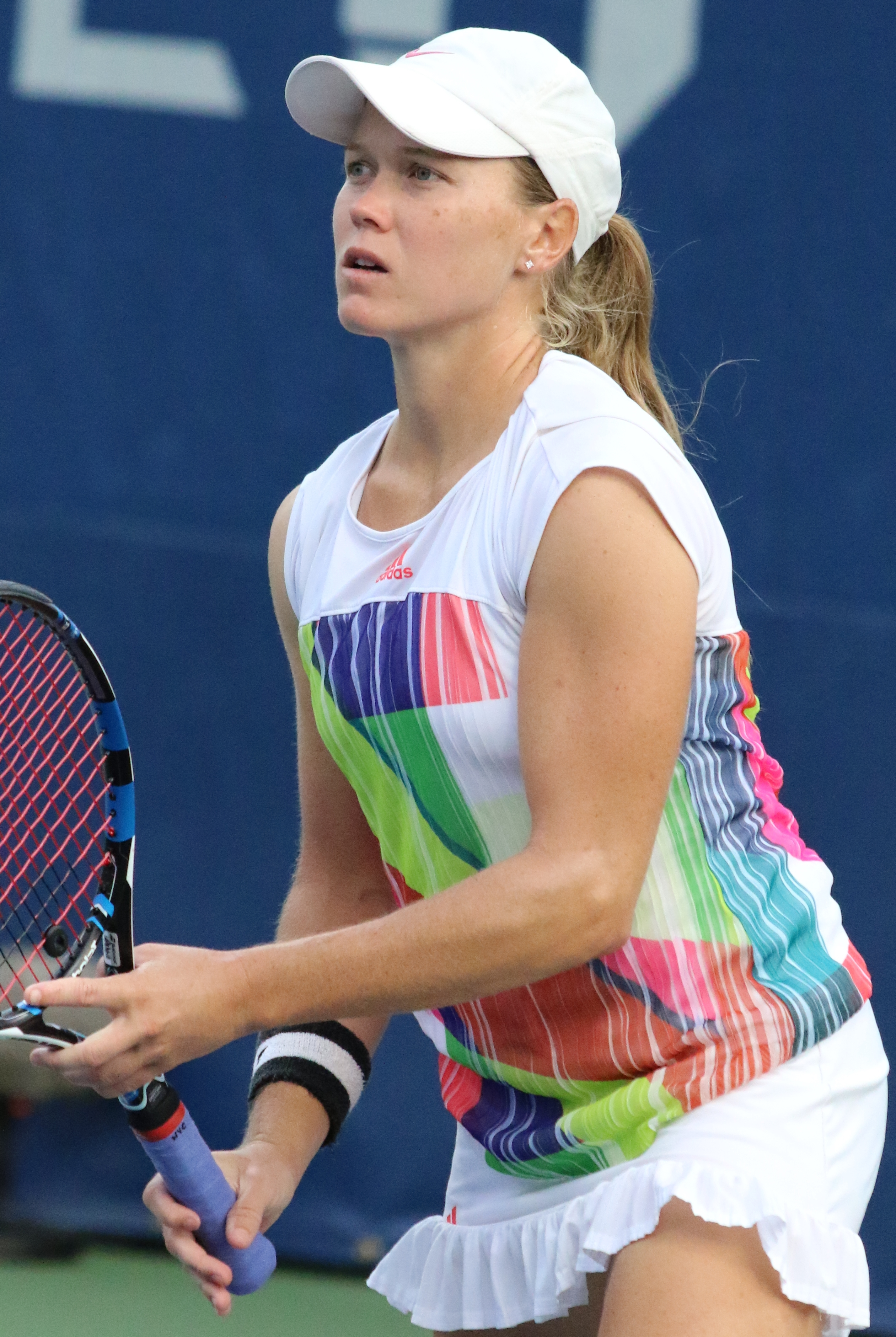 Weinhold US16 (9)